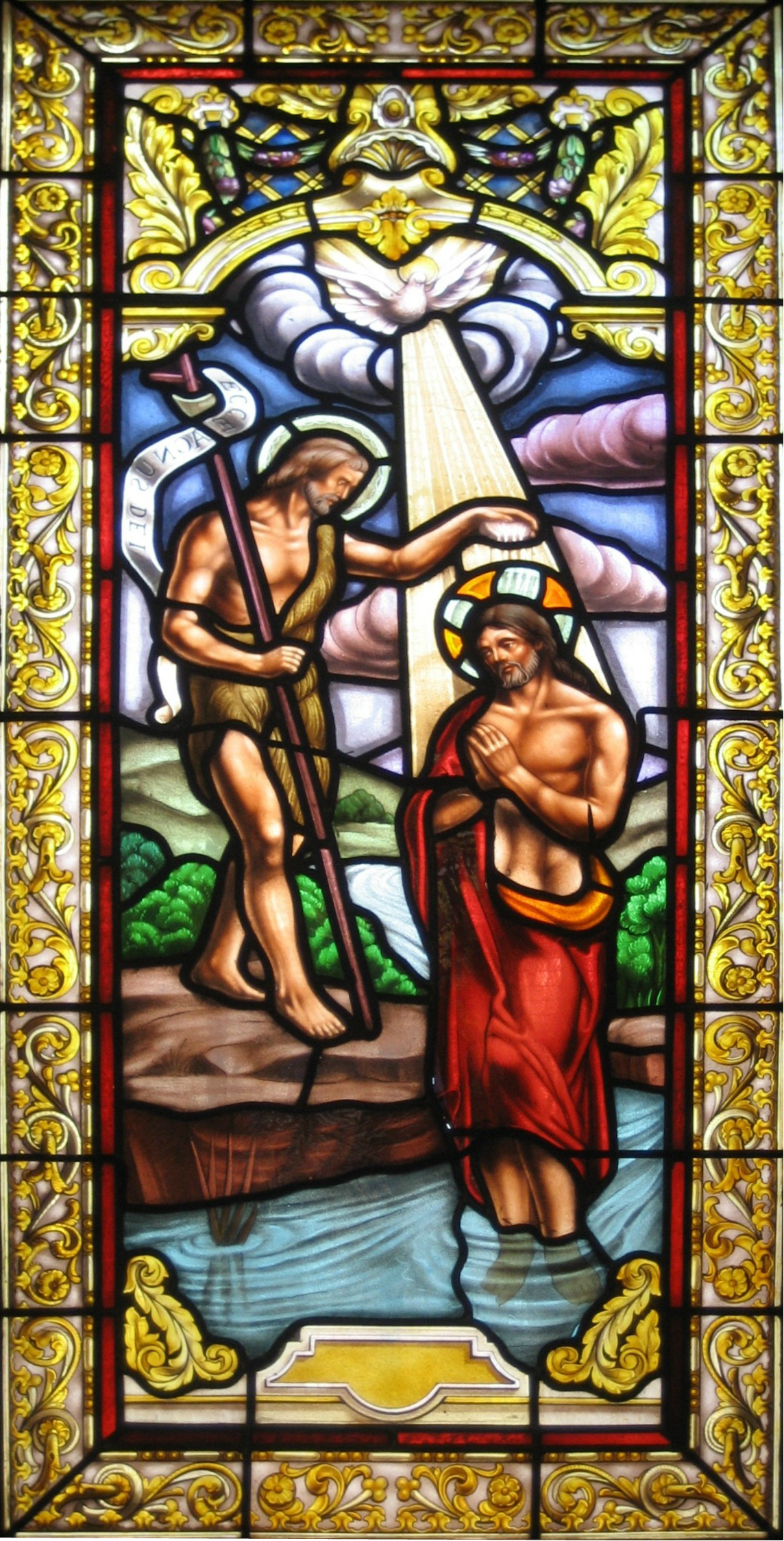 Cuba, Parroquia de San José de Jatibonico: Vitral del Bautismo del Señor.